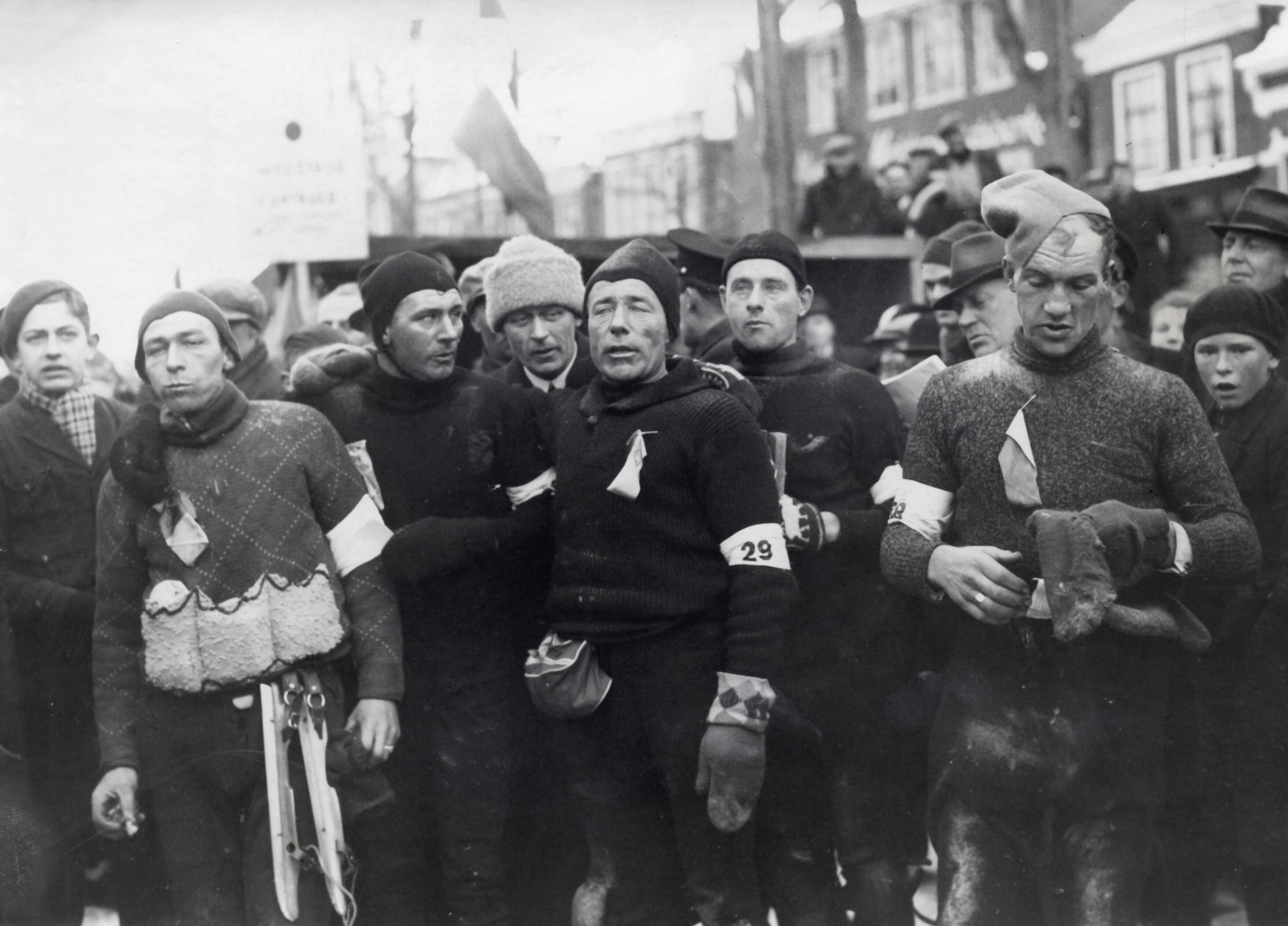 De vijf winnaars van de Friese Elfstedentocht van 30 januari 1940 na de finish in Leeuwarden: Vlnr Auke Adema uit Franeker, Sjouke Westra uit Warmenhuizen, Cor Jongert uit Alkmaar, Dirk van der Duim uit Warga en met scheve muts Piet Keyzer uit De Lier. Nederland, Leeuwarden, 30 januari 1940.